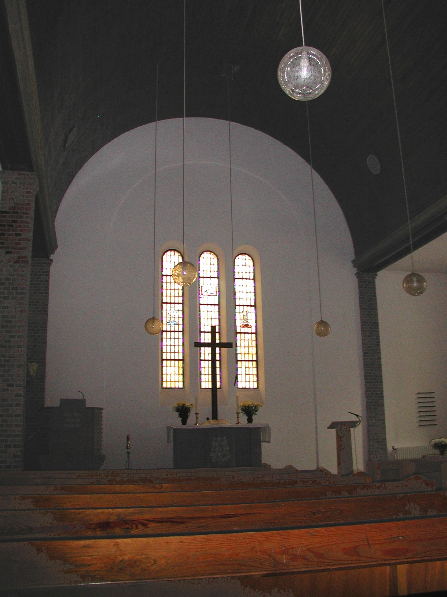 Altarseite in der Dorfkirche Friedrichsfelde